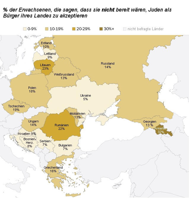 Antisemitismus in Ost- und Südosteuropa laut Umfrage des Pew Research Center, Religious Belief and National Belonging in Central and Eastern Europe (Mai 2017)